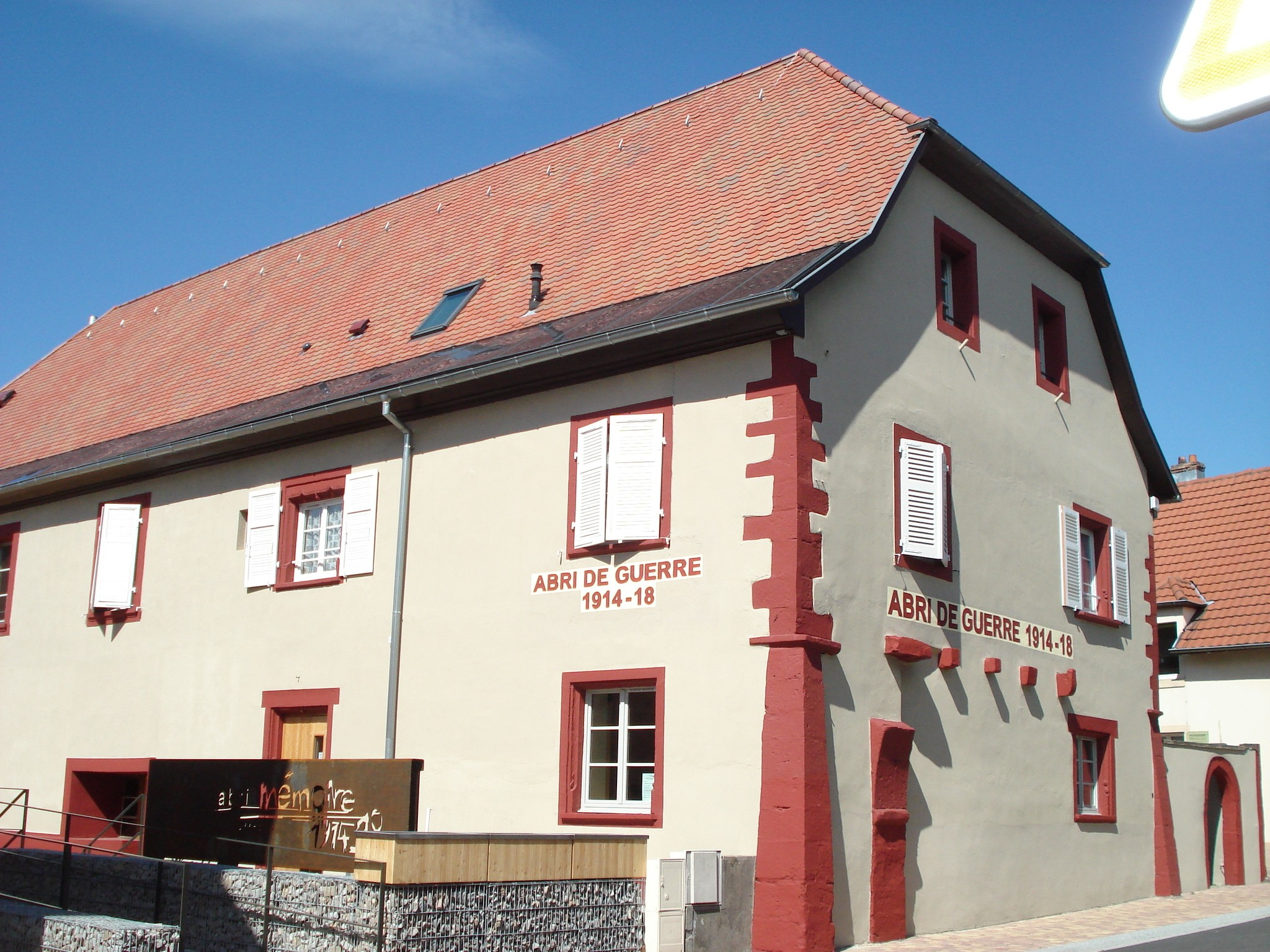 Uffholtz Abri-mémoire après restauration, ancienne maison de vigneron, 1 rue du Ballon, 3e quart 16e siècle .